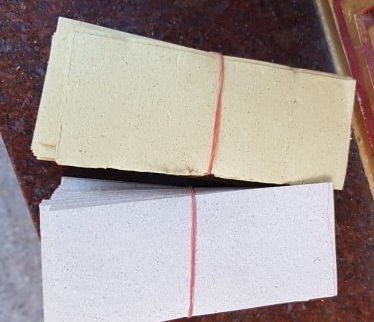 金錢與白錢，合稱金白錢，用於神靈的兵將或有地位的陰神